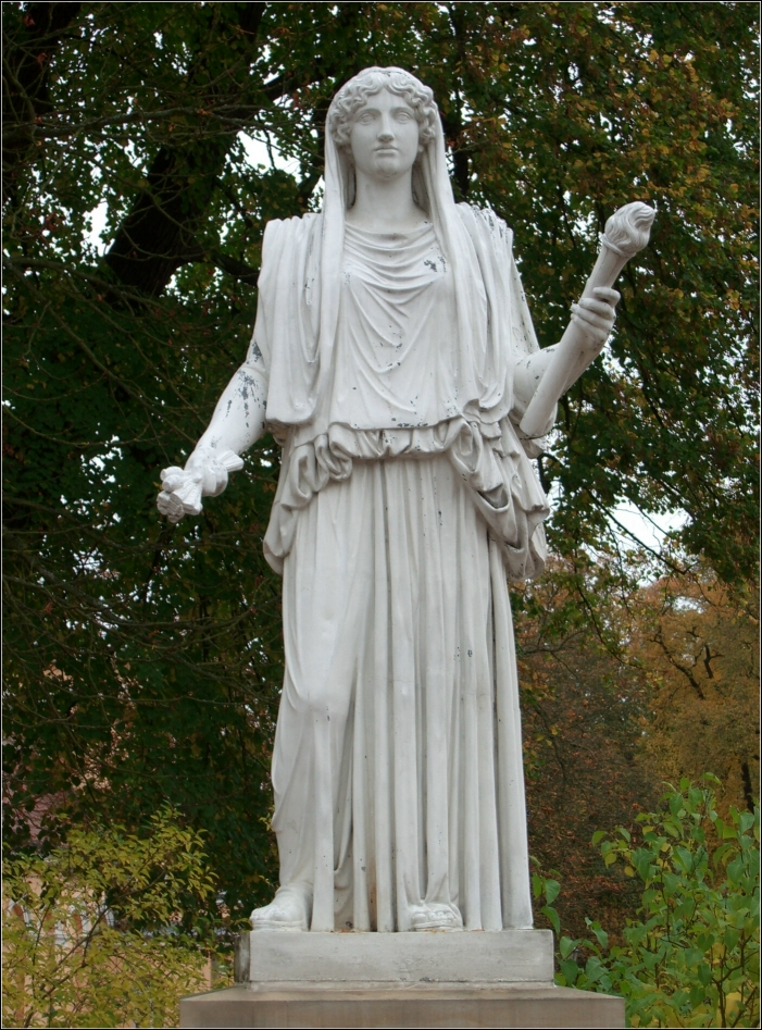 Demeter in Neustrelitz